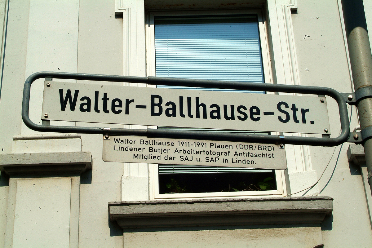 Sie haben ein besseres Bild? Sogar ein historisches Dokument als Bild(ungsförderung)? Zeigen Sie' s uns. Stiften Sie es hier - ihren Kindern, unseren Enkeln, allen Menschen.